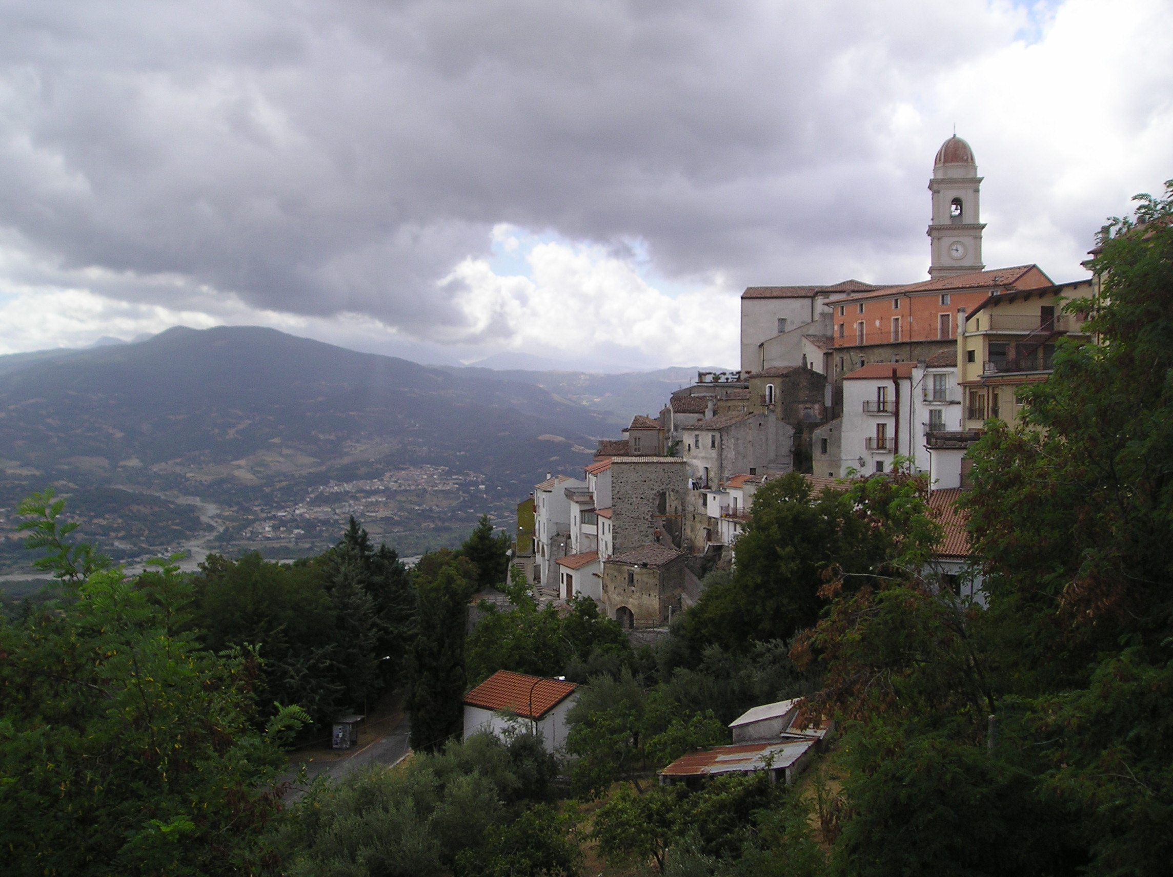 Veduta del "Portello" e del centro storico. Chiaromonte, alias 'Montegrano', centro degli studi sul campo che portarono Banfield a enucleare il paradigma del familismo amorale. Sicilianu: Panurama di Chiarumunti.